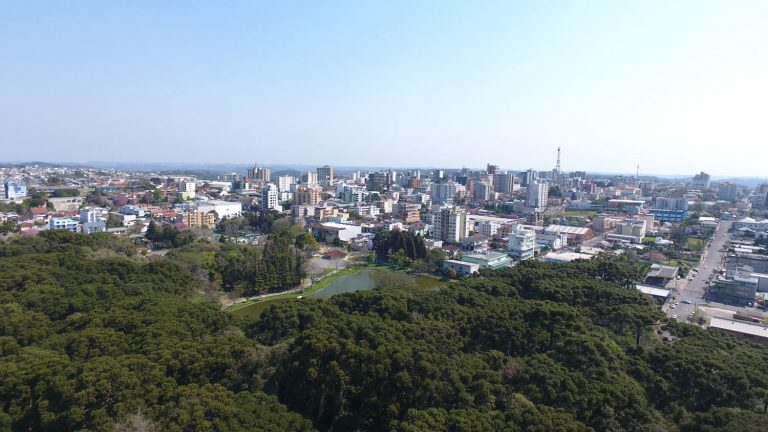 Panoramy Farroupilha